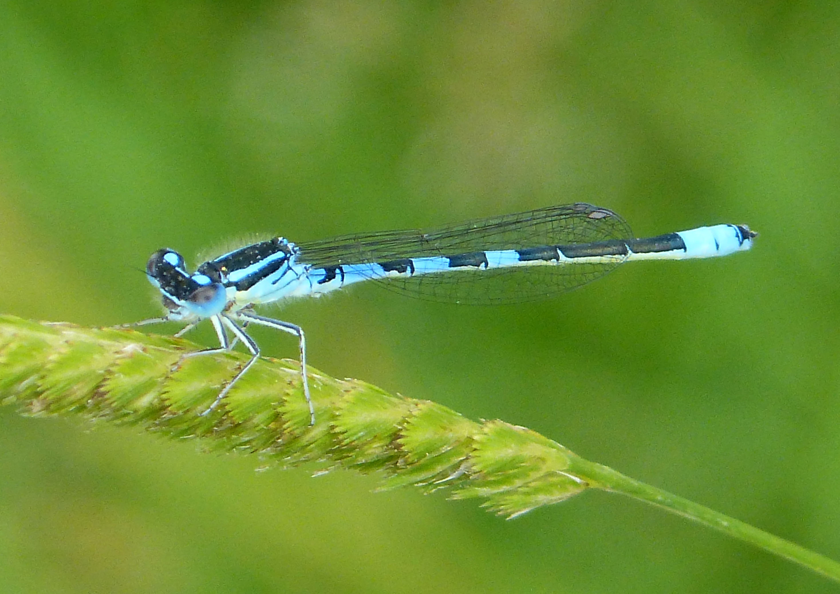 Cherine Reserve. La Brenne, France